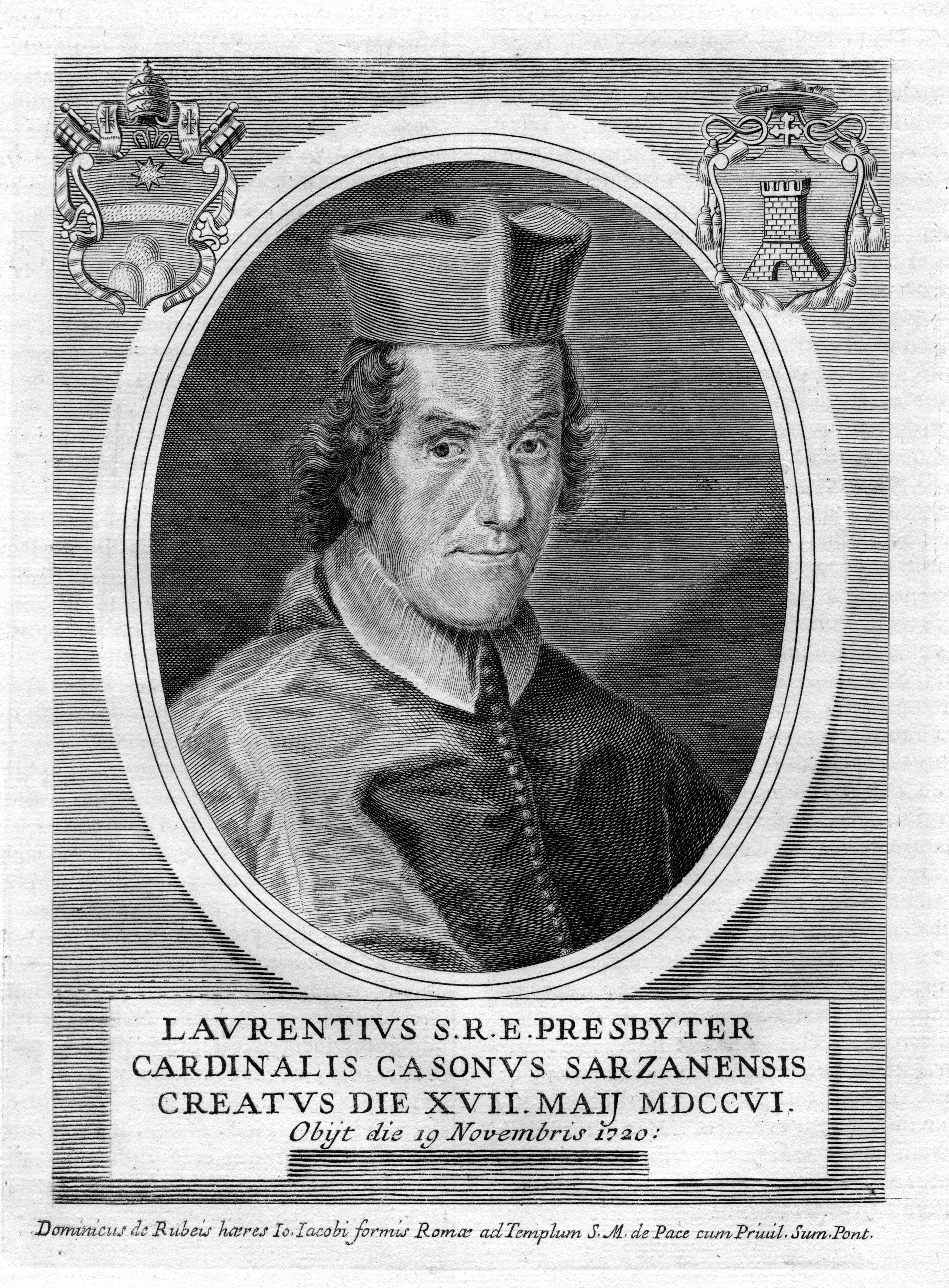 portrait gravé